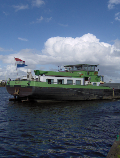 Foto Europaschip Wantij, voormalig Europanummer 3250151